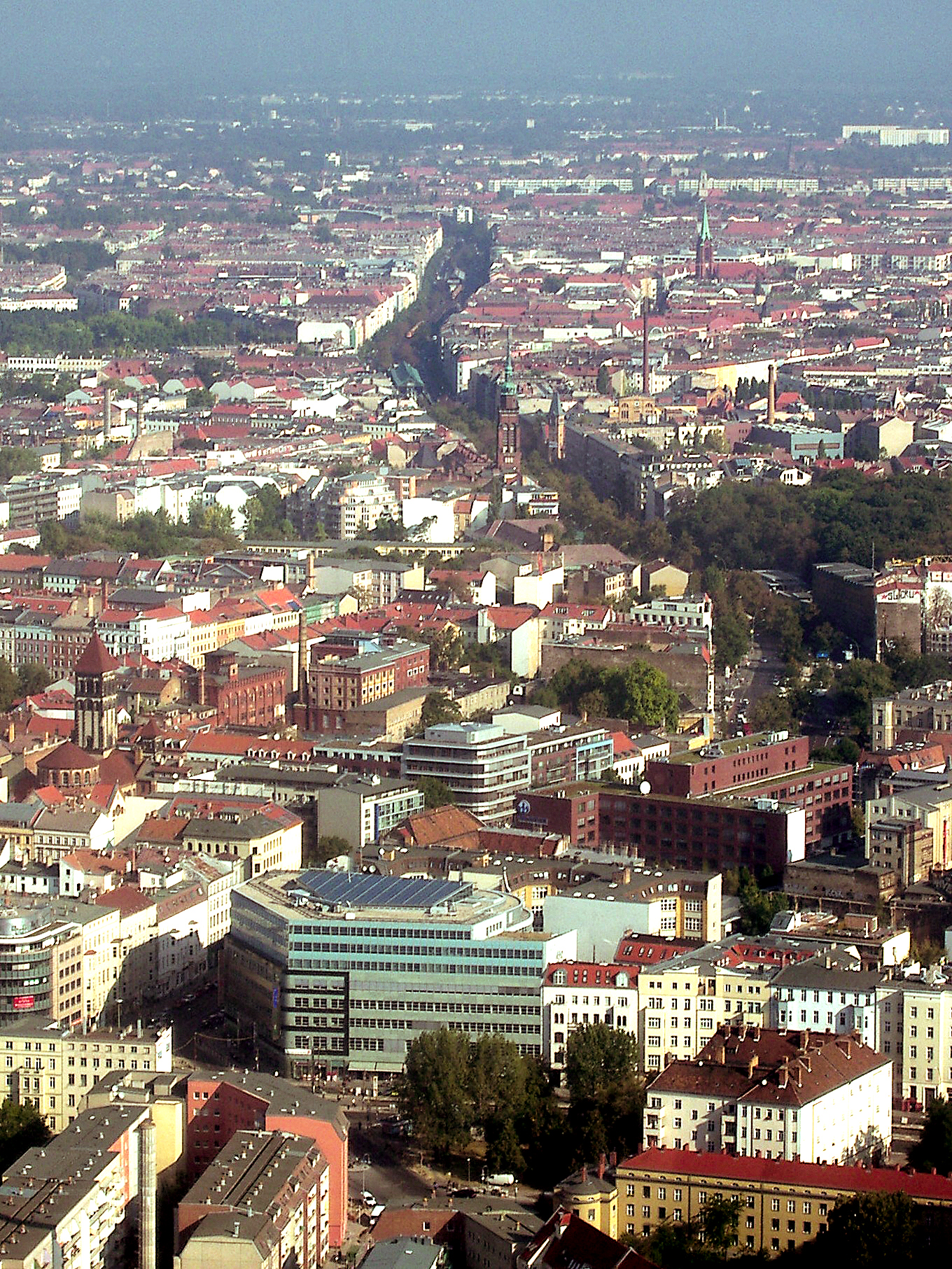 Berlin: Blick auf die Schönhauser Allee vom Fernsehturm